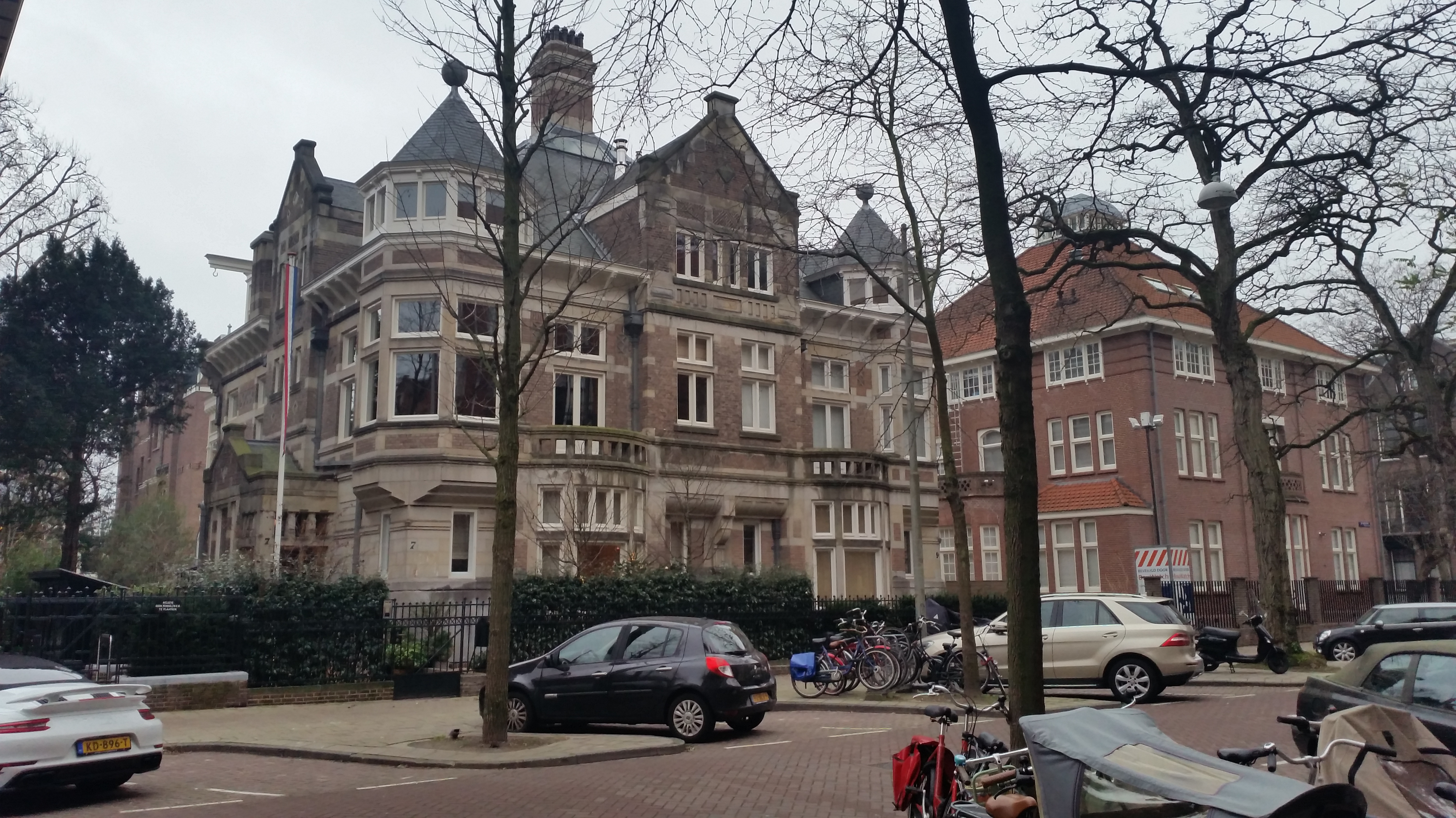 Jan Luijkenstraat 7-9, Amsterdam, uiterst rechts Villa Reens